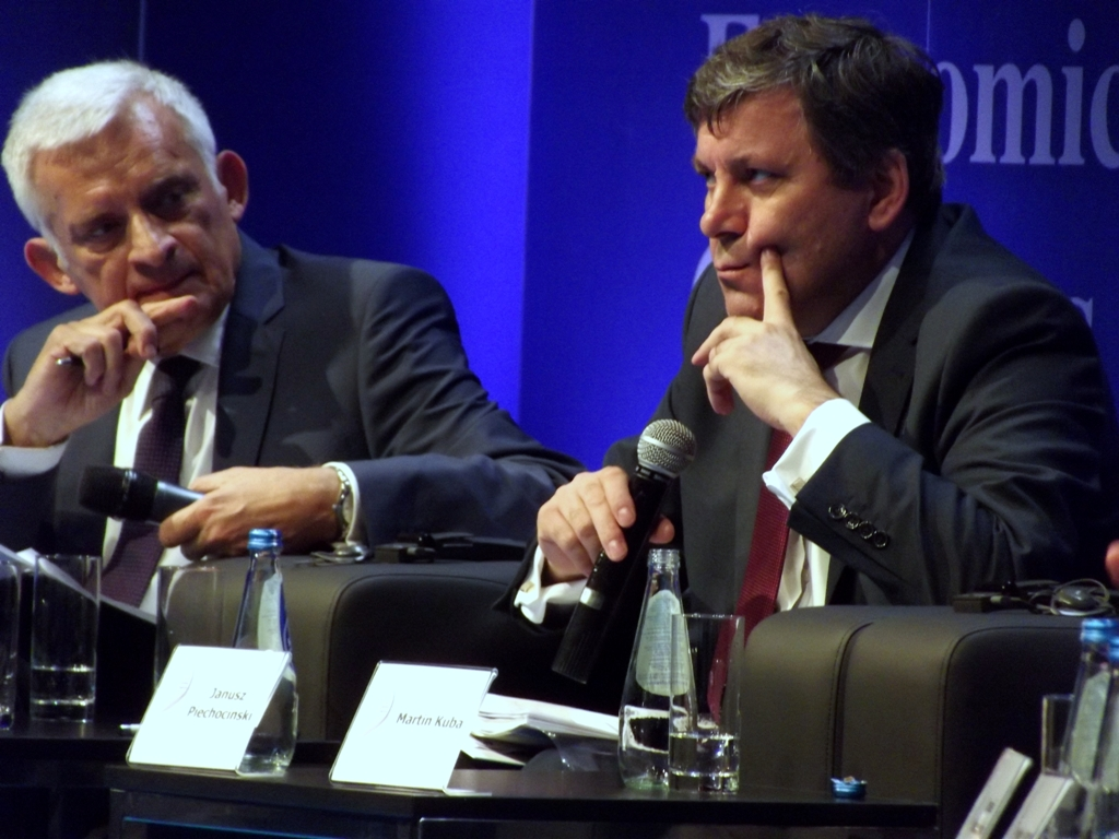 Janusz Piechociński na Europejskim Kongresie Gospodarczym w 2013 roku.